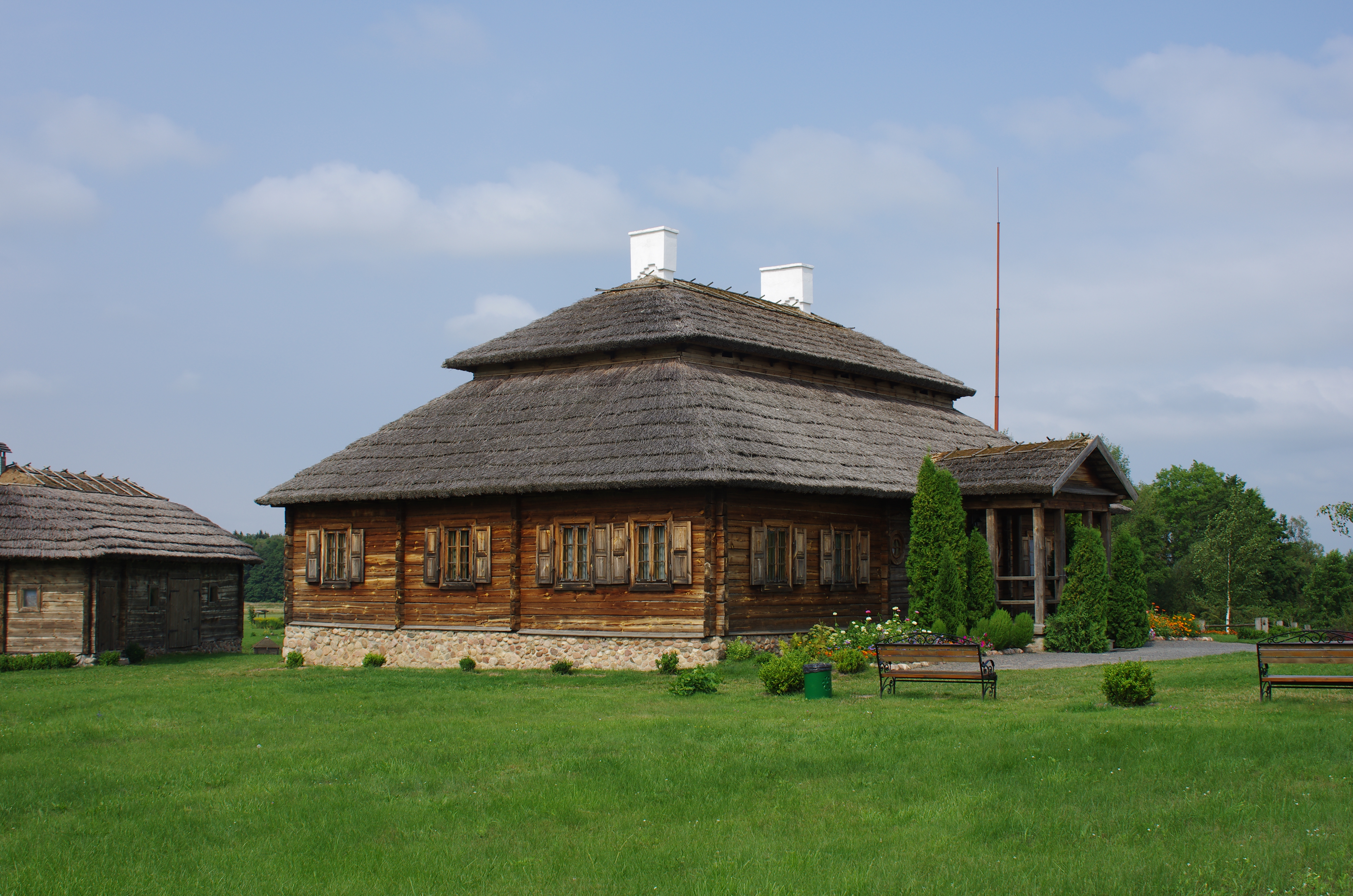 Музей-сядзіба Тадэвуша Касцюшкі